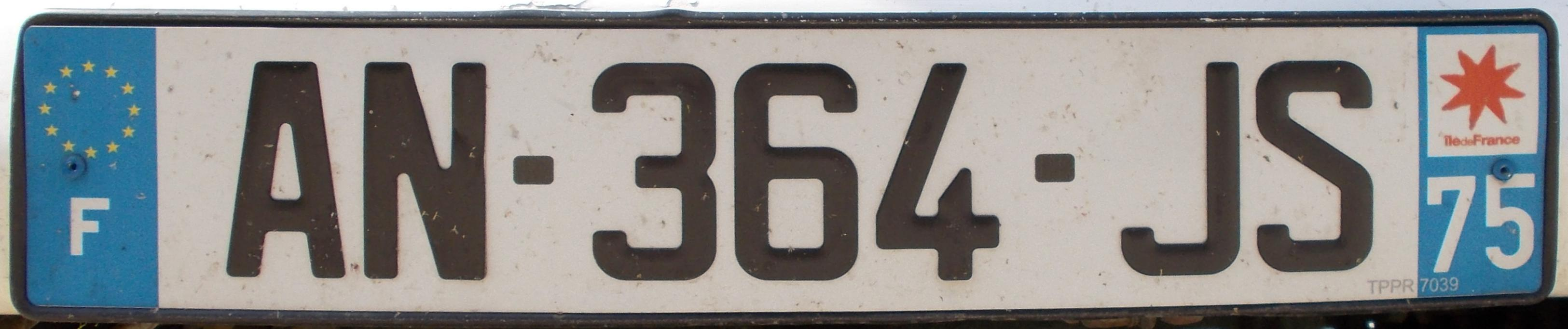 Номерний знак